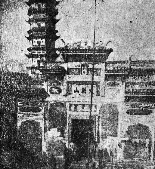 金华永福禅寺及万佛塔旧照。